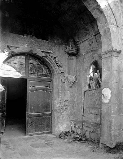 Vue intérieure du porche Renaissance devant le portail occidental de la nef, avant 1896.